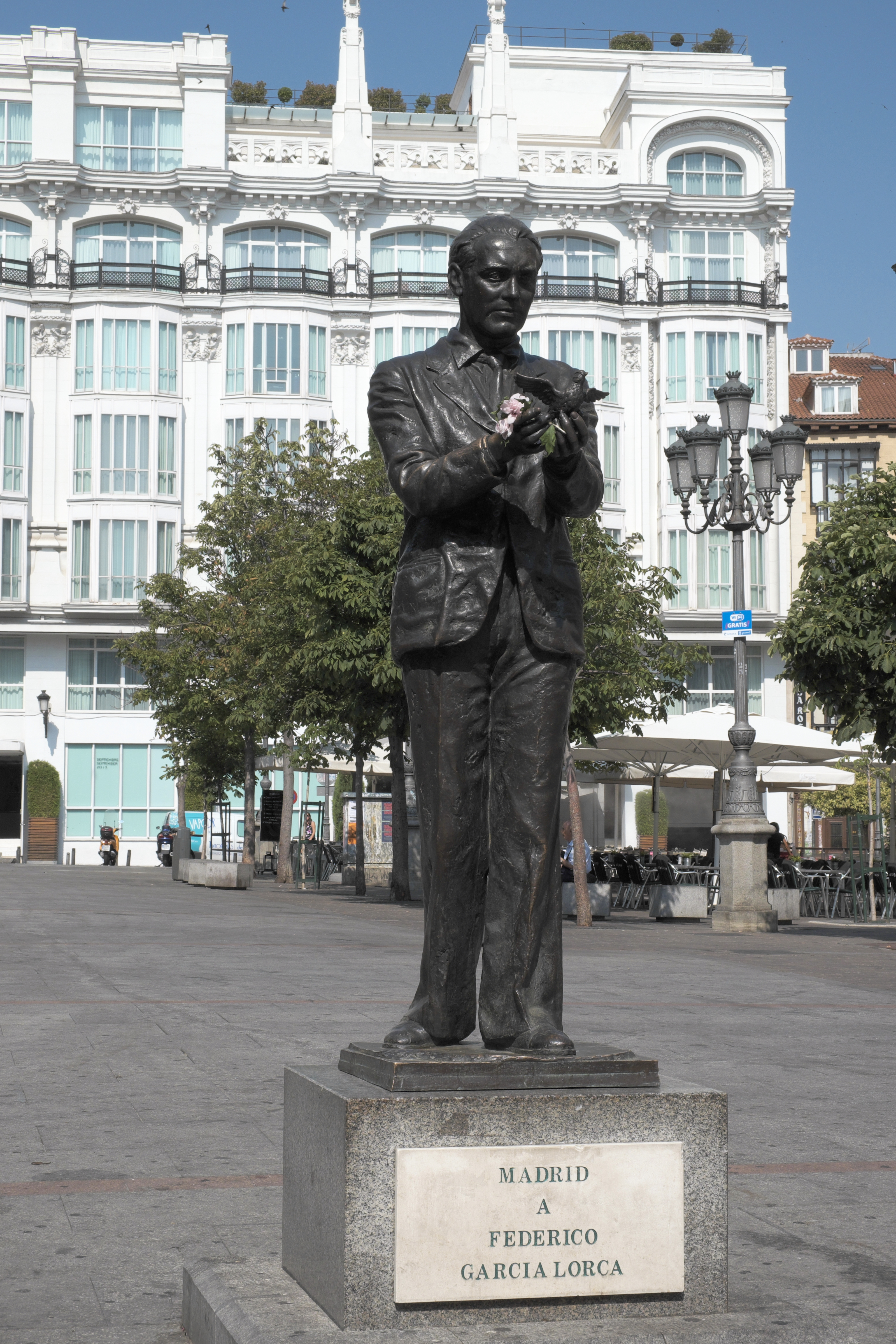 Statue von Federico García Lorca an der Plaza de Santa Ana in Madrid (Spanien)